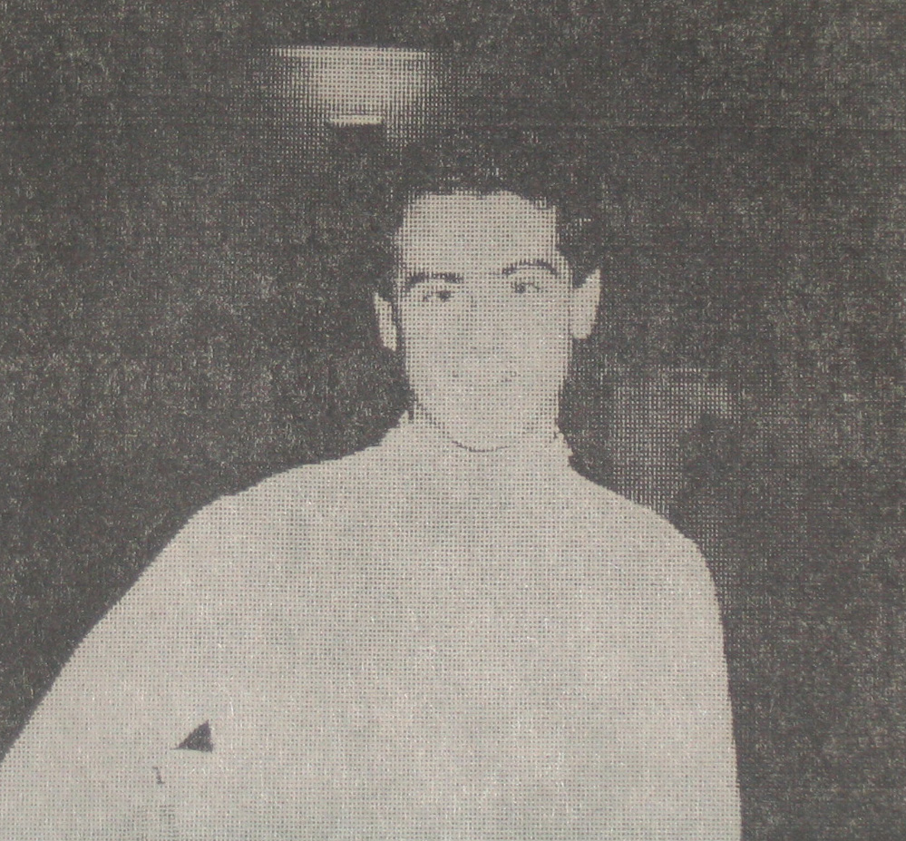 Angelo Arcidiacono, schermidore italiano.